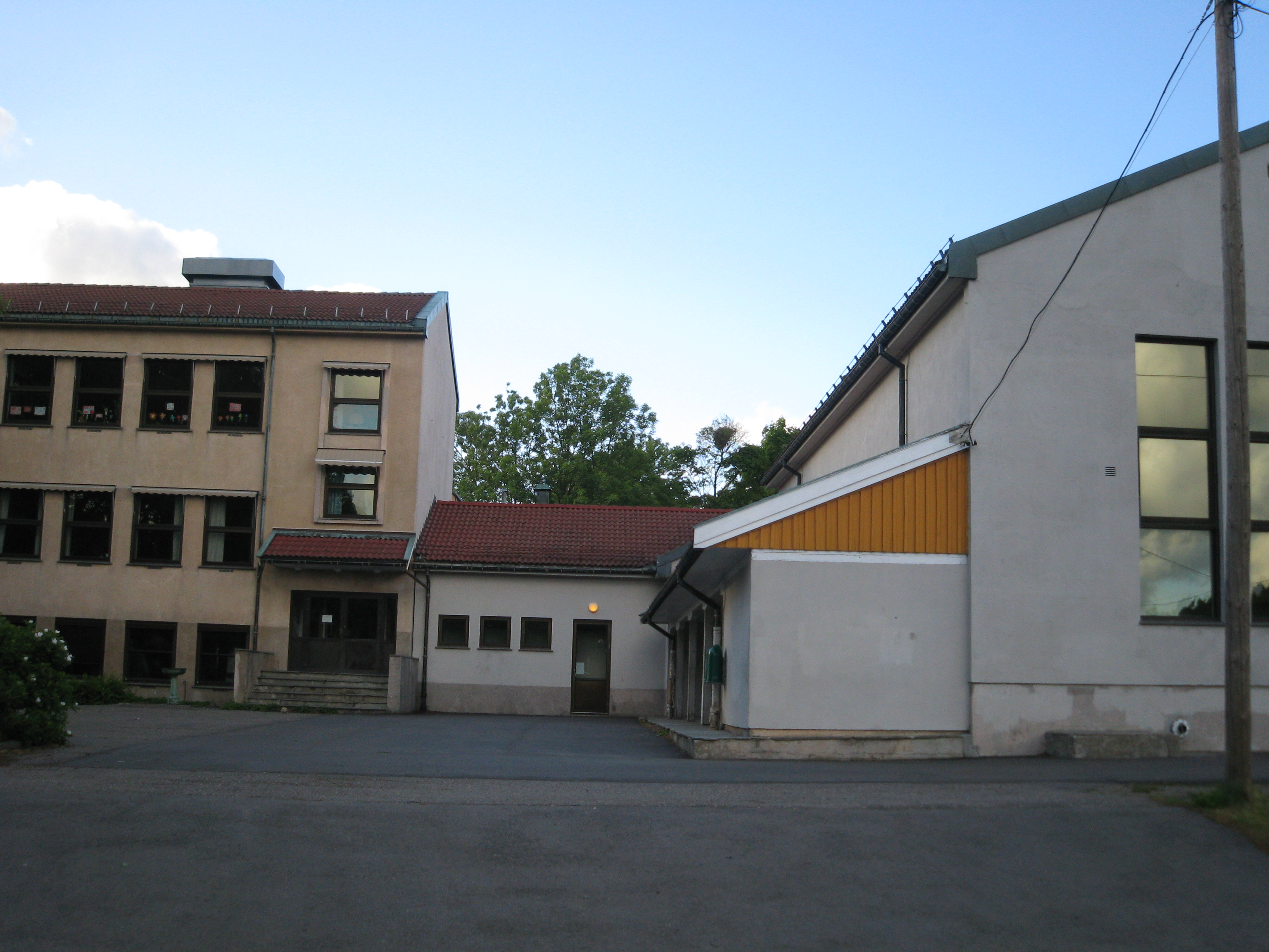 Herstad skole ligger på Herstad. Foto: Lars Åge Kamfjord.